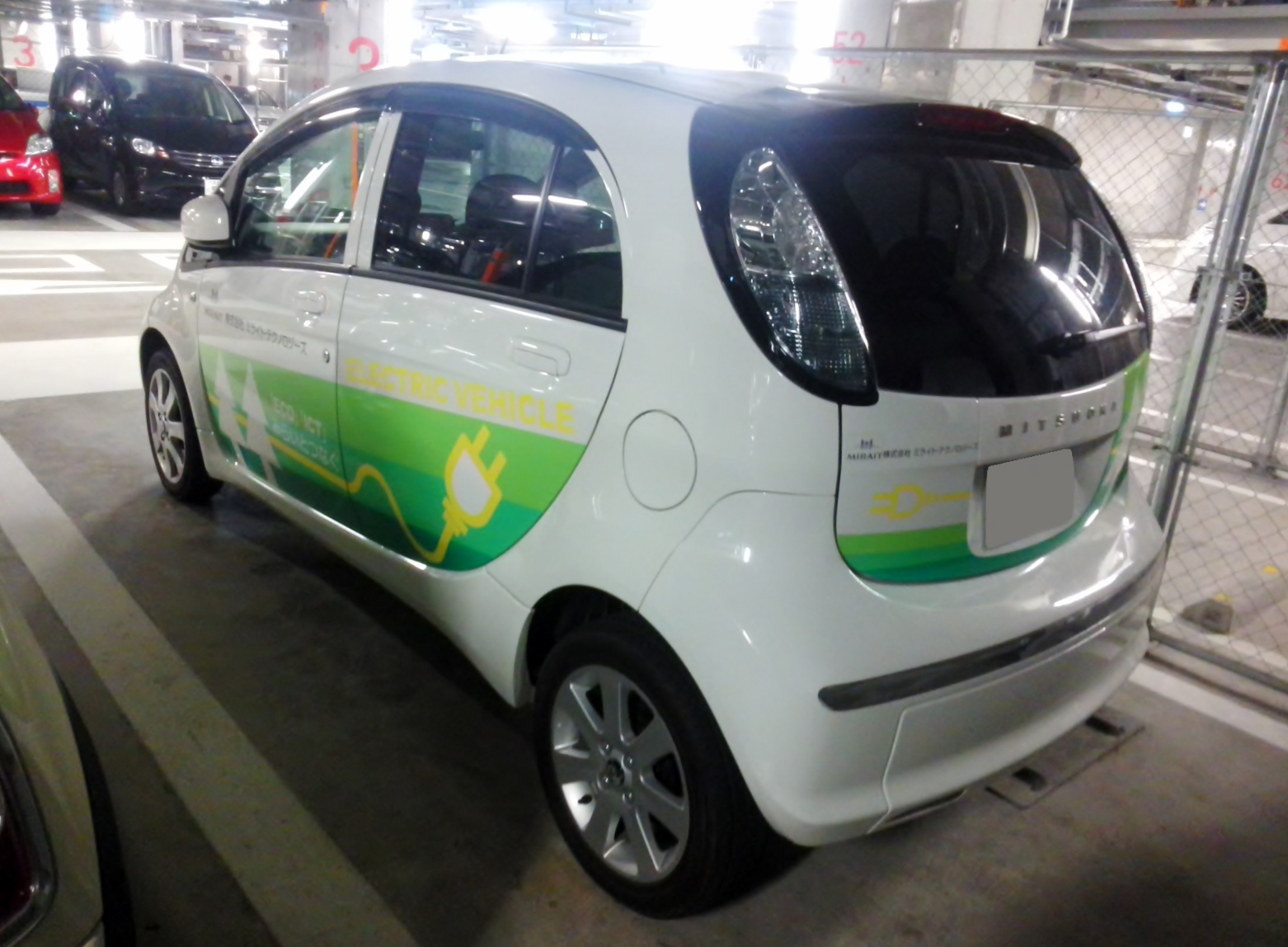 HA3WLDDB型光岡・ライクをリアから撮影。